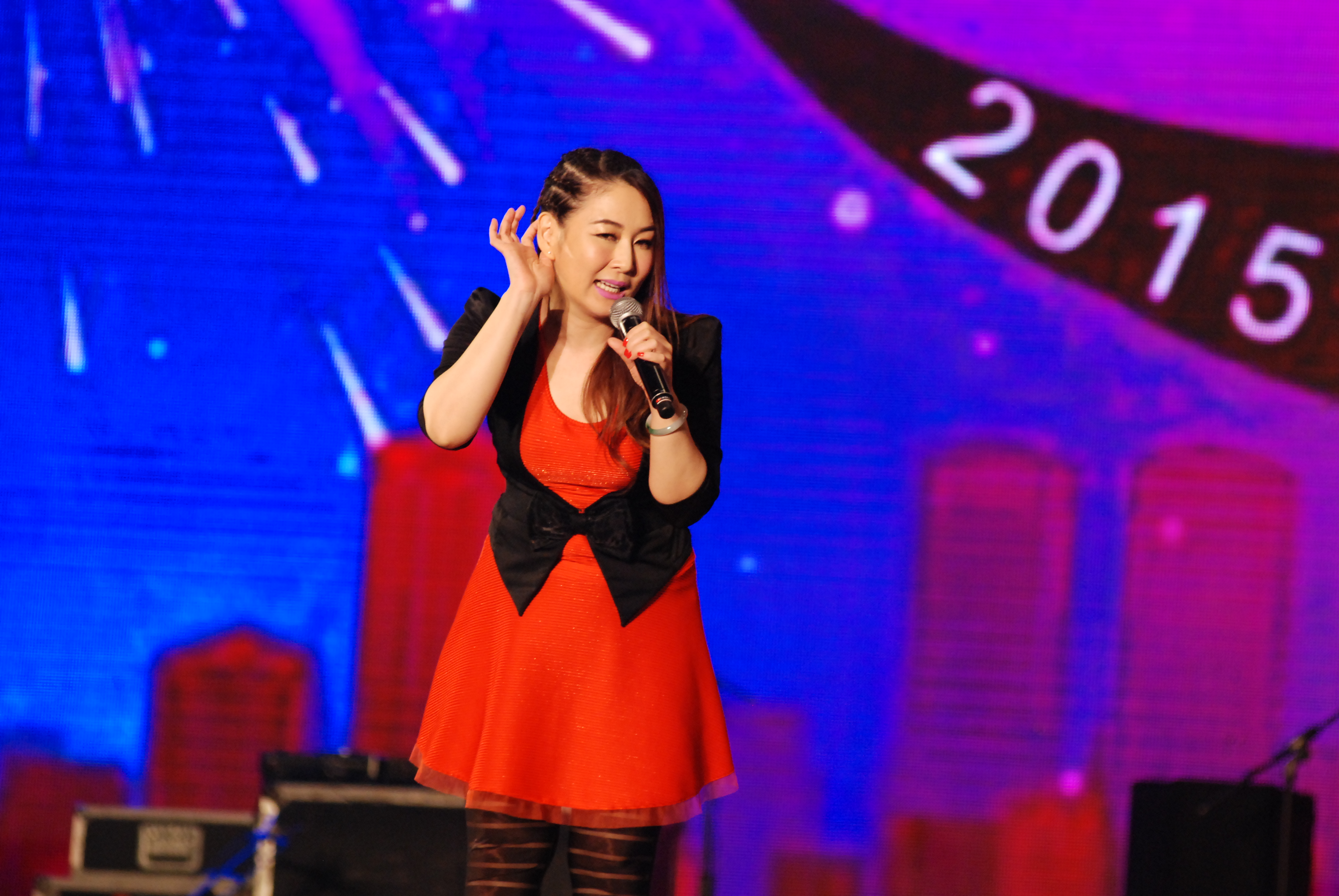 中文（台灣）: 張秀卿.jpg